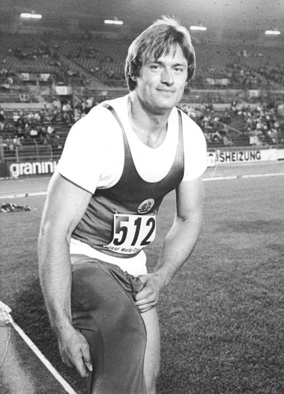 Wolfgang Schmidt ADN-ZB Mittelstädt 01.06.1978-str-Berlin: Europarekord durch Wolfgang Schmidt--Schon zu einem frühen Termin am Saisonbeginn lassen die DDR-Leichtathleten aufhorchen. Nach dem 200-m-Weltrekord und den DDR-Rekorden vom 28.05. sorgte Wolfgang Schmidt (SC Dynamo) bei einem Abendsportfest am 31.05. für eine weitere Bestmarke. Er schleuderte den Diskus auf 68,92 m und verbesserte damit seinen Europarekord um 32 cm.(Foto von einem früheren Wettkampf)